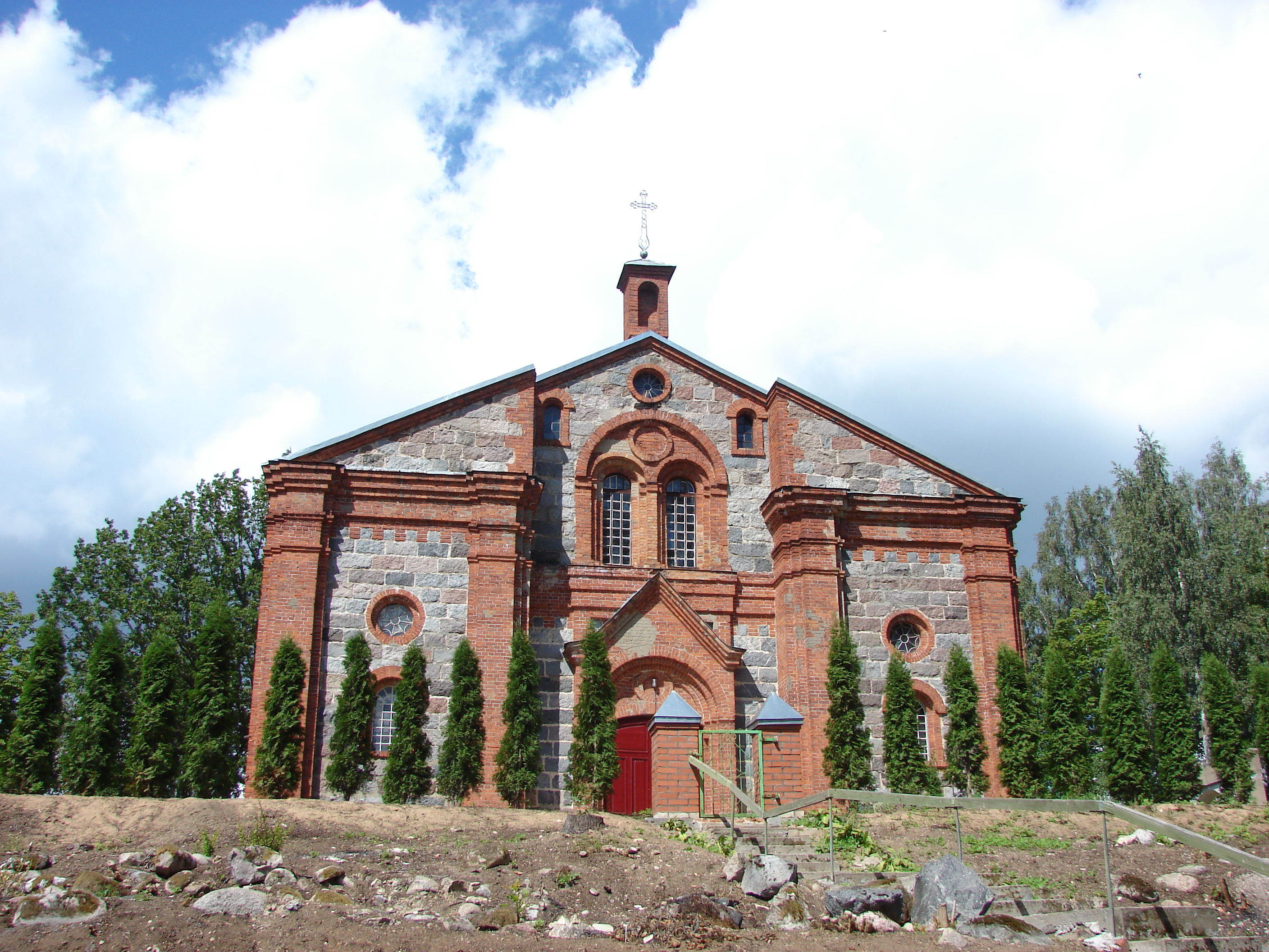 Raipoles Sv. Jāņa Kristītāja Romas katoļu baznīca (1932.), Nirzas pagasts, Ludzas novads, Latvia